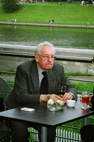 Andrzej Wajda (b. 1926), Polish film director